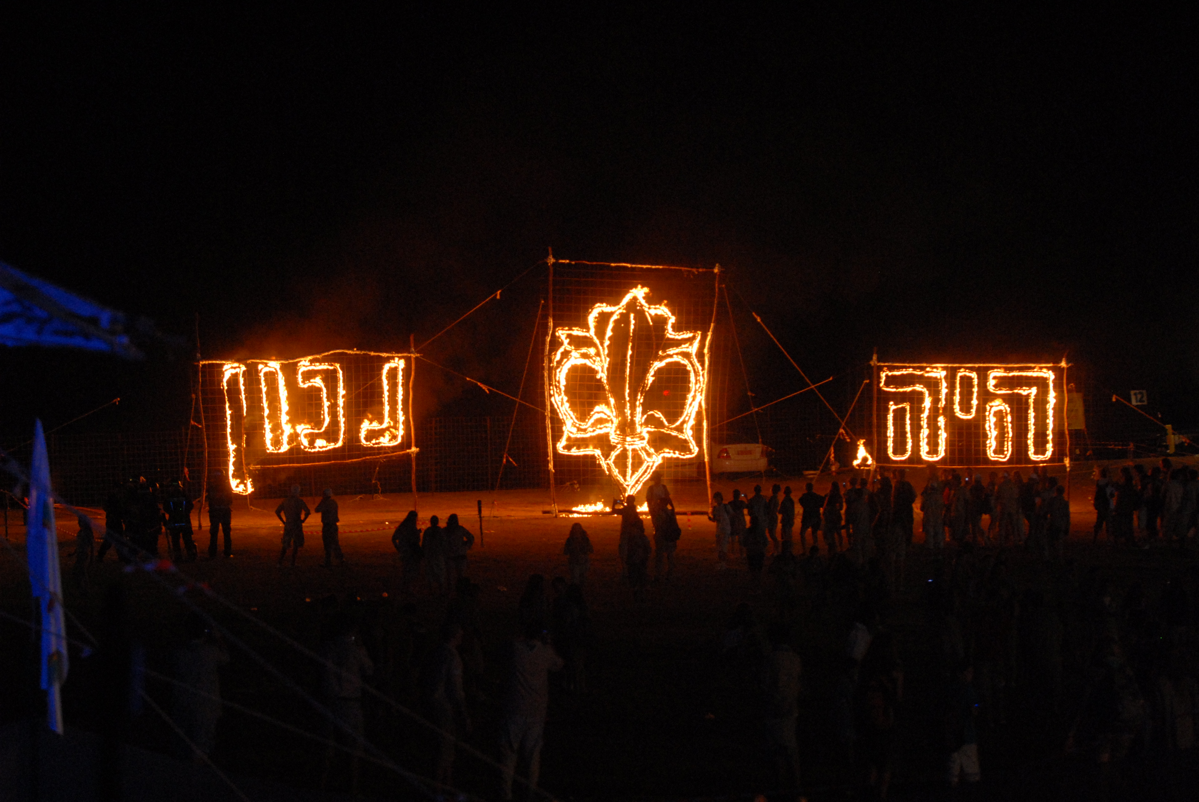 כתובת אש של תנועת הצופים העבריים בישראל